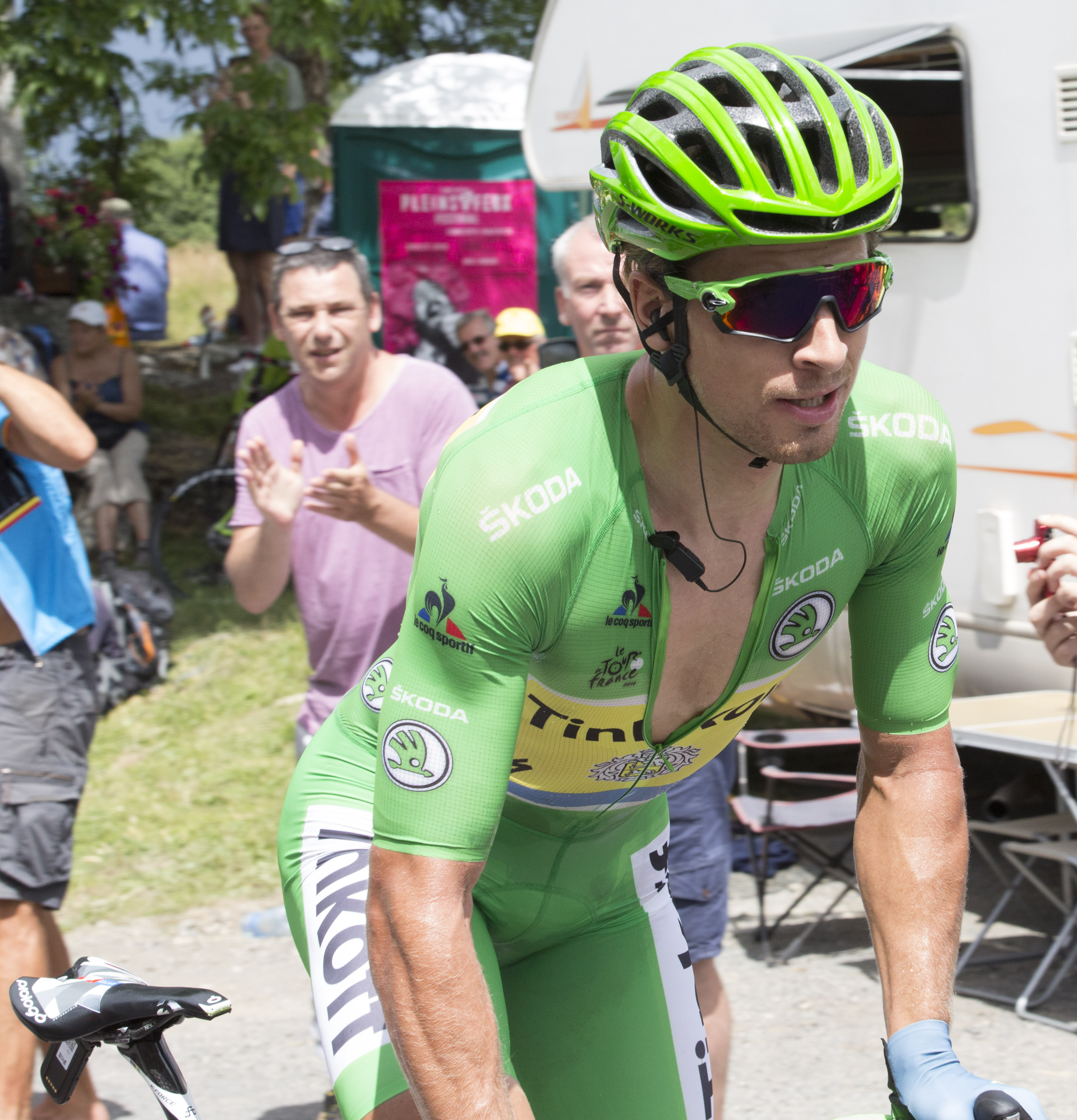 Peter Sagan